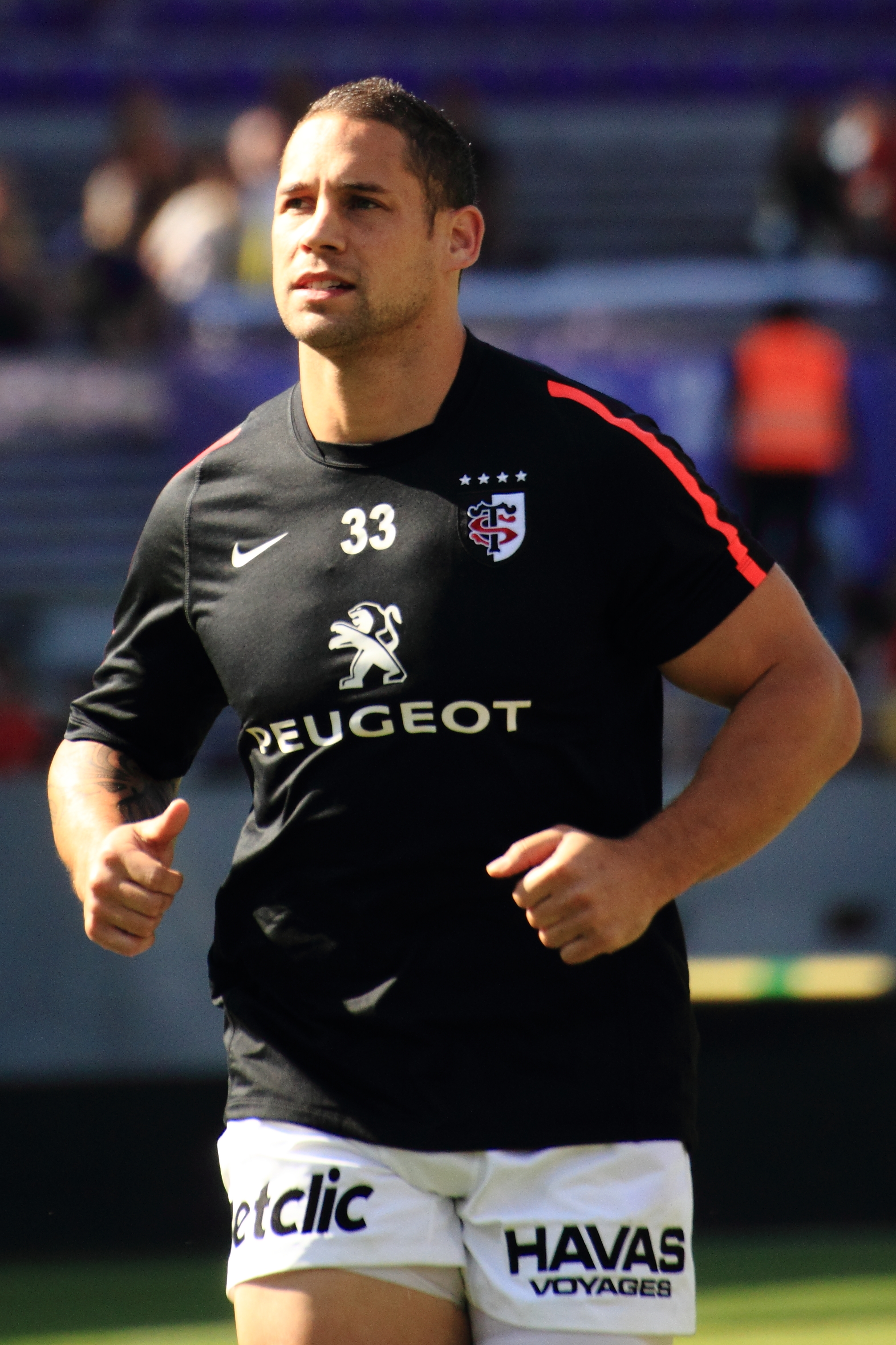 Luke McAlister à l'échauffement de Stade toulousain vs ASM